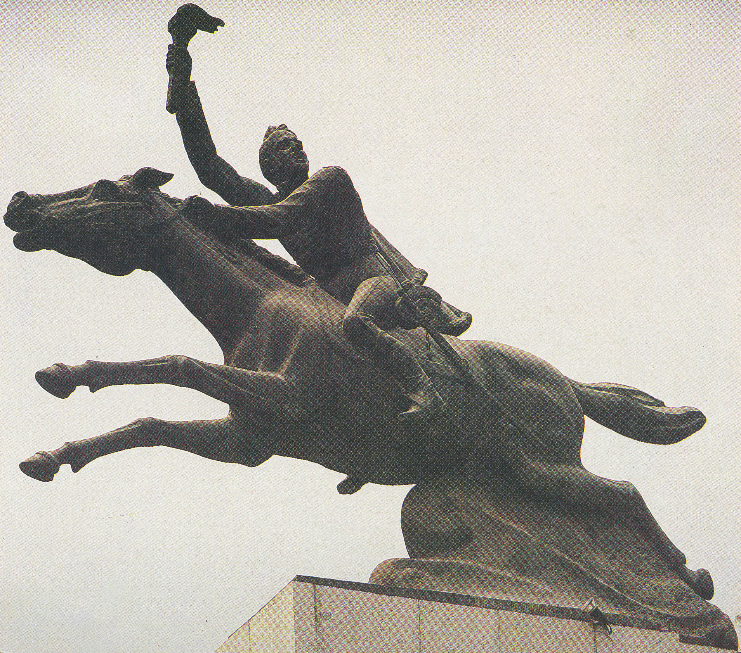 Monumento a Manuel Rodríguez de Blanca Merino, ubicado en el Parque Bustamante de Santiago de Chile. Archivo de la Biblioteca del Museo Nacional de Bellas Artes.